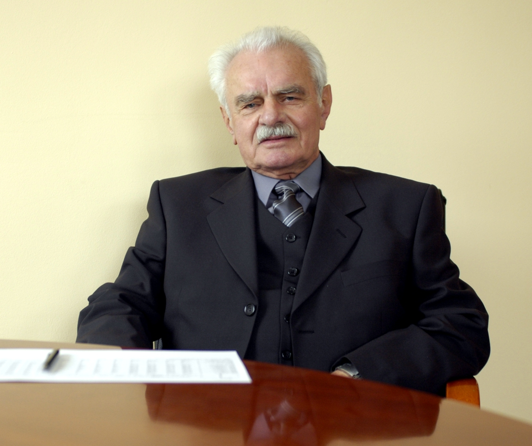 Witold Kawecki (1931-2016), inżynier